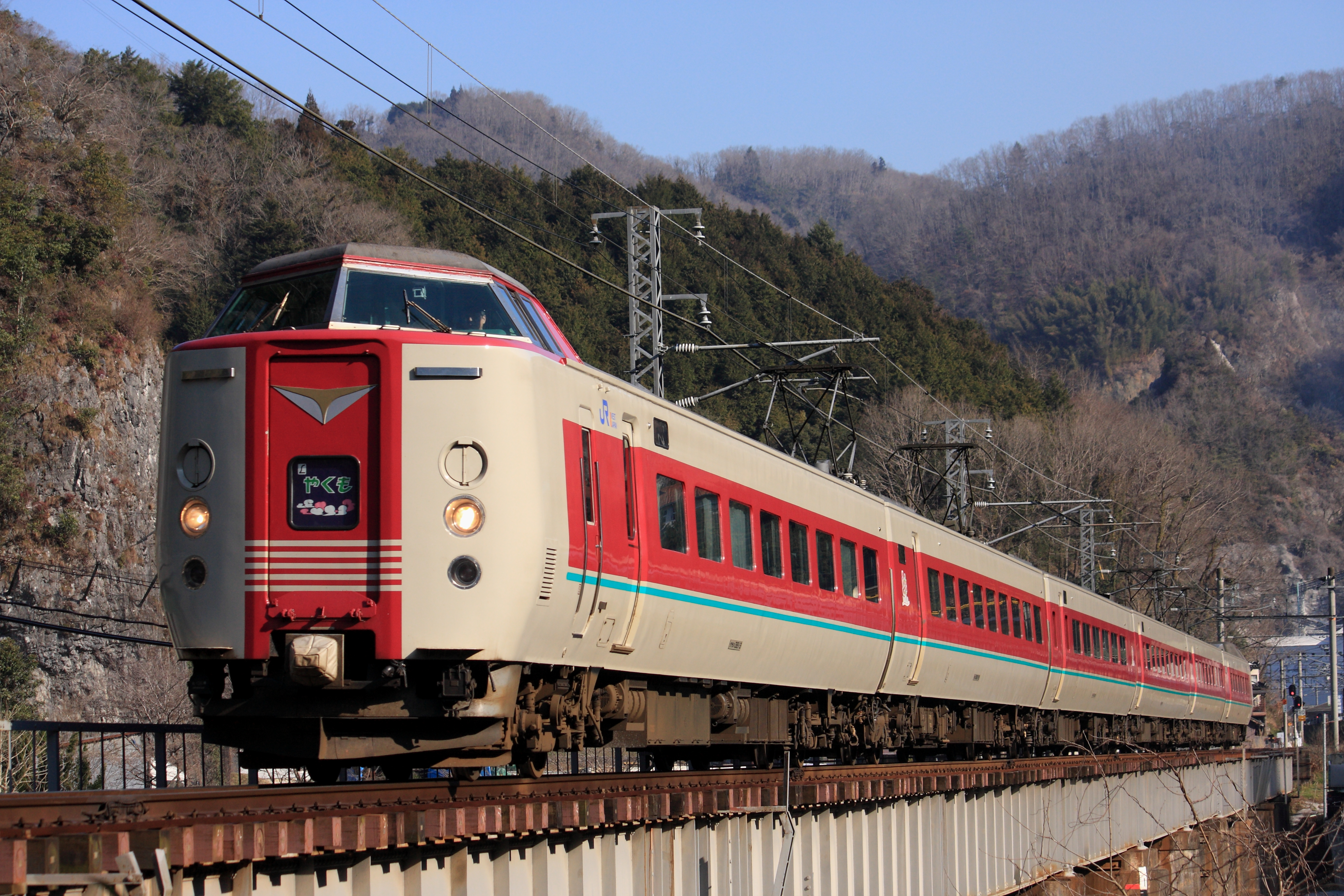 JR西日本381系電車（先頭車がクモハ381-3）。特急やくも6号 伯備線、井倉-広石（信） 第7高梁川橋梁